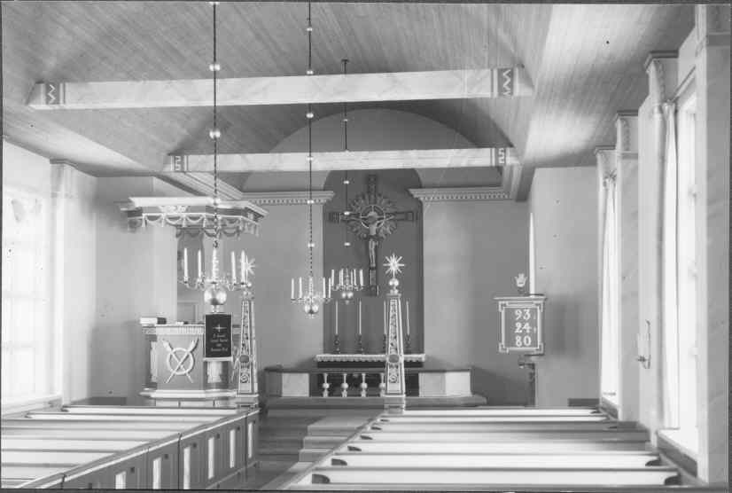 Interiör mot koret. Byggd år 1933. Kategori: (02) InteriörerInteriör mot koret. Byggd år 1933.